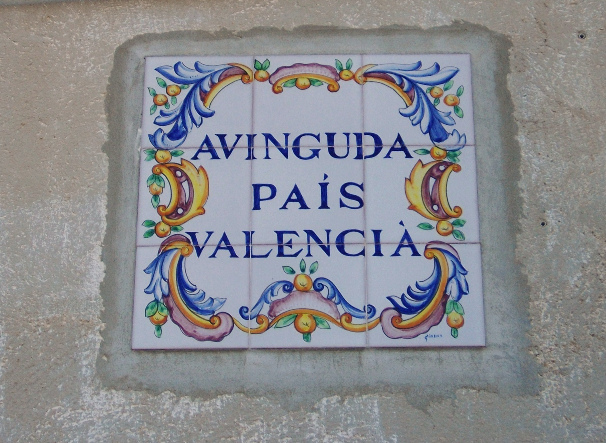 Avinguda País Valencià a Alcalà de la Jovada, la Vall d'Alcalà, Marina Alta, País Valencià.